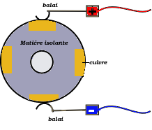 Collecteur moteur à courant continu Domaine public / auteur Paul Mazeres le 05/09/2004.